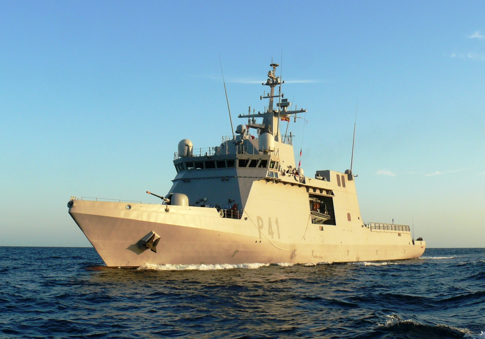 Meteoro (P-41), Buque de Acción Marítima (BAM) de la Armada Española, el 19 de septiembre de 2011 en Cartagena